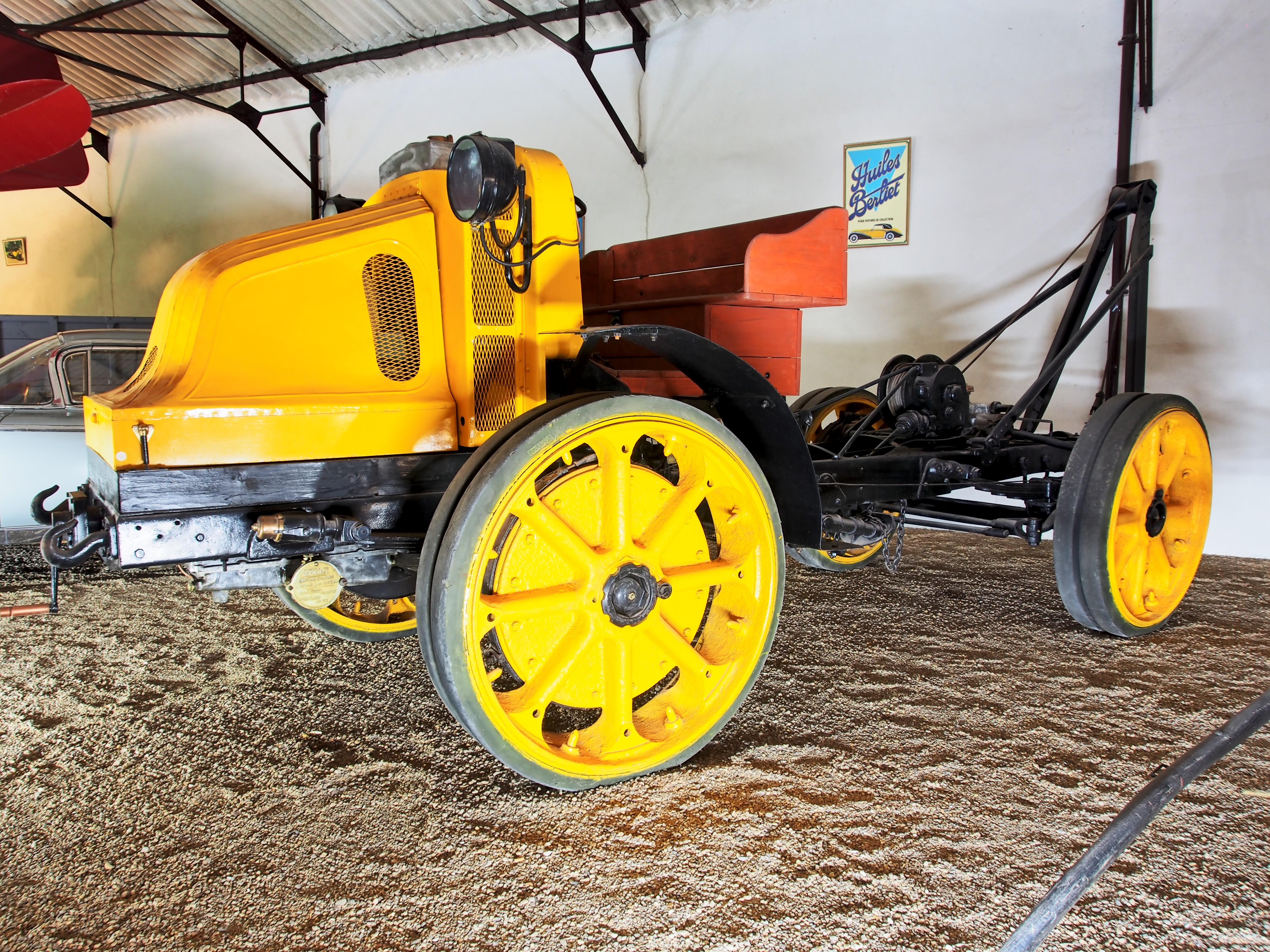 Photographed at Musée Maurice Dufresne, Azay-le-Rideau, France.